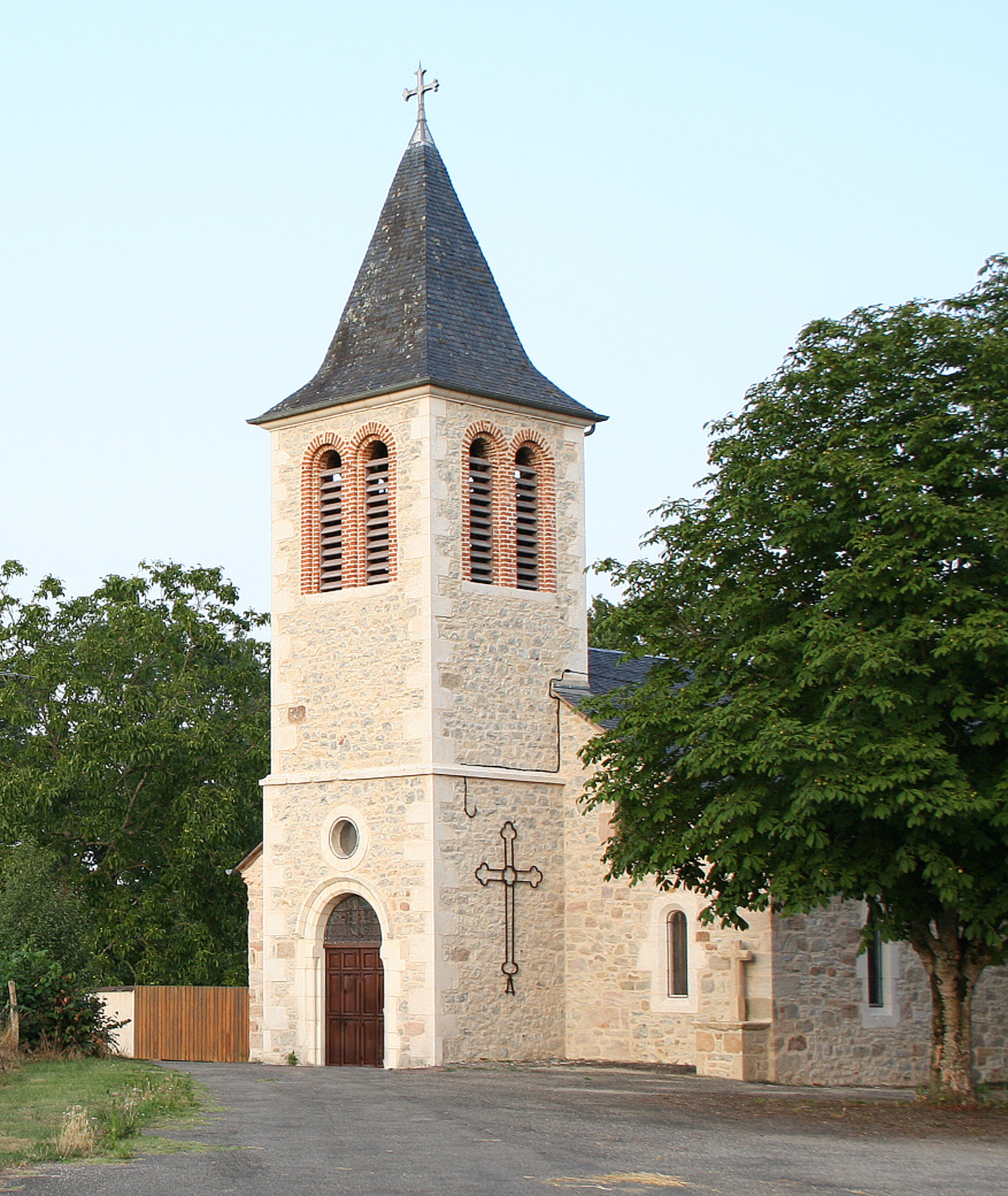 Eglise Saint Martin de Girac (46)